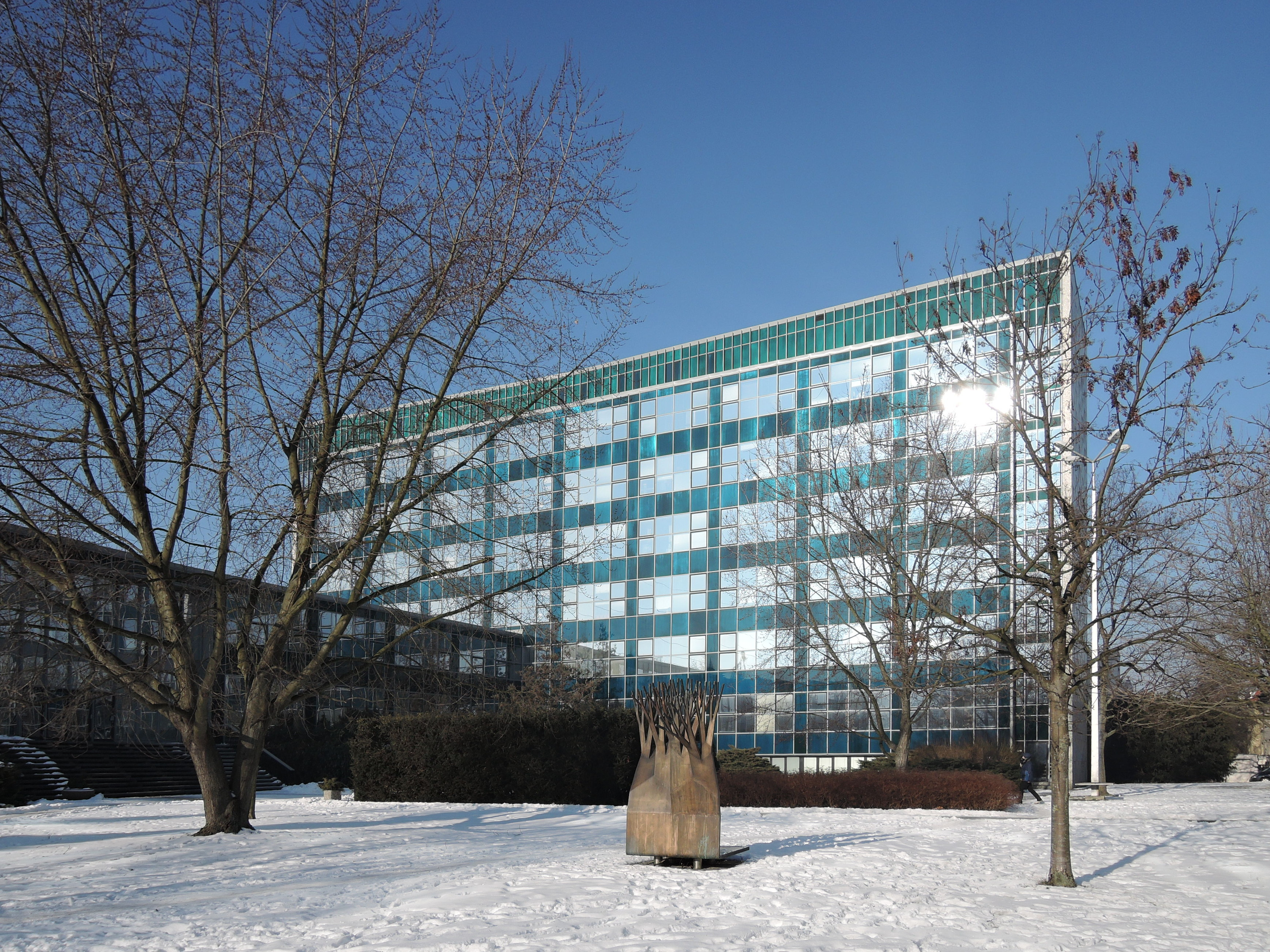 Praha, Břevnov, Heyrovského náměstí, Ústav makromolekulární chemie AV ČR, v popředí pomník Otty Wichterleho